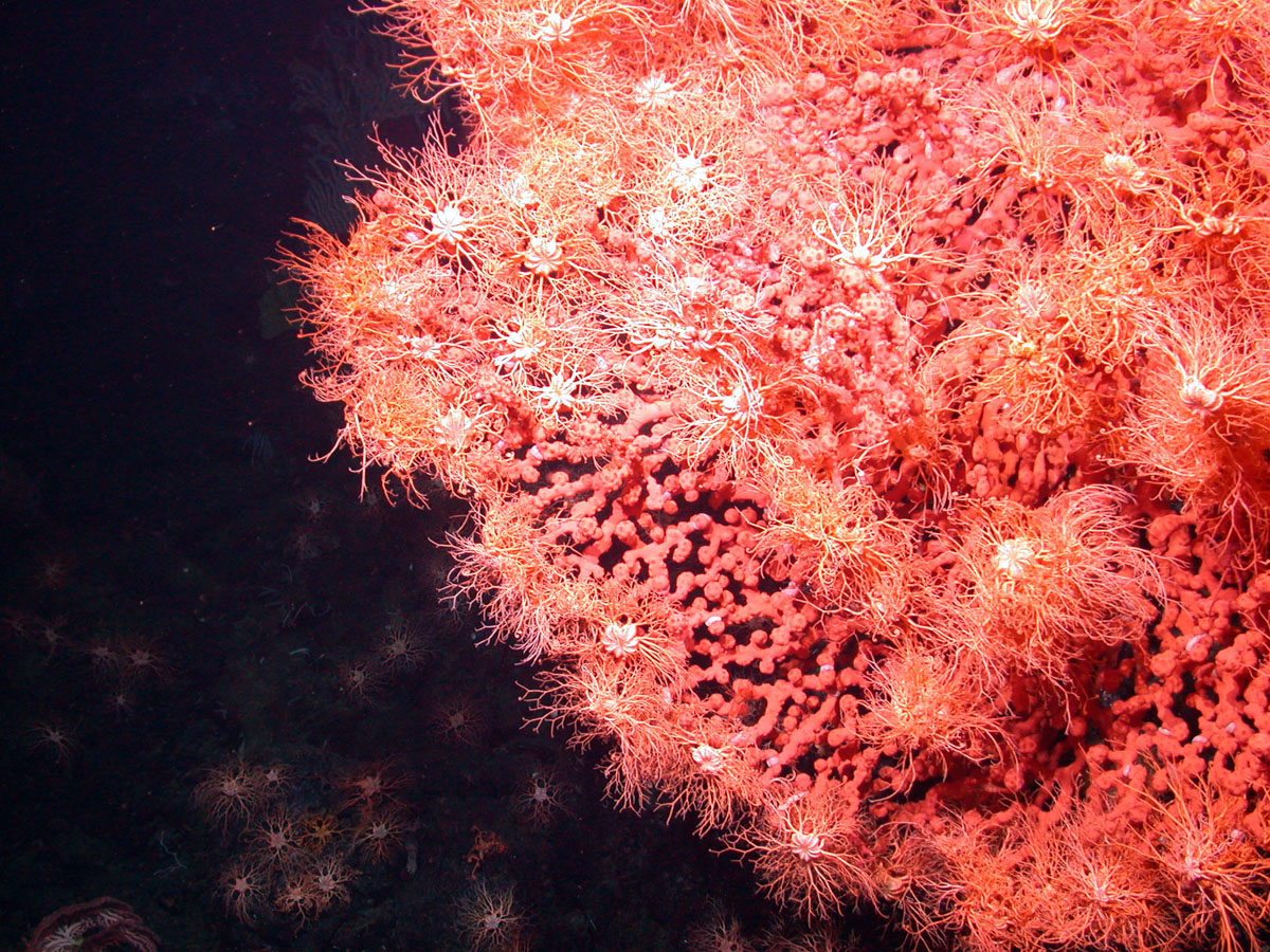 Gorgonocephalus sp.